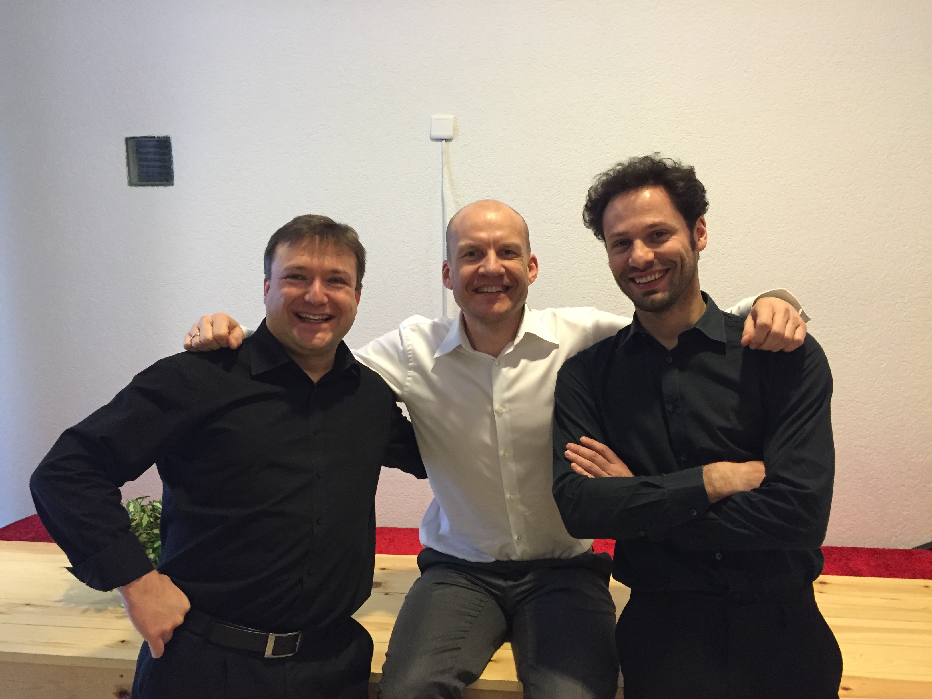 Dirigent Kris Stroobants, Klarinetist Roeland Hendrikx en Violist Wim Spaepen in CC Muze te Zolder